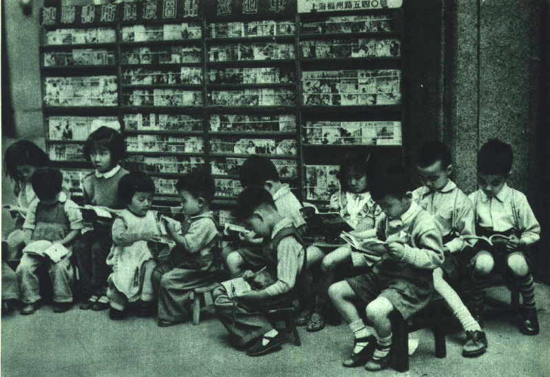 1951年上海连环画出版业联合书店便利店前儿童